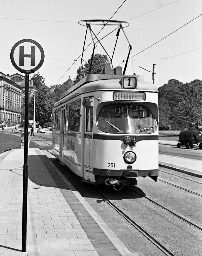 Großraumwagen Tw 251 der Straßenbahn Kiel an Haltestelle Schlossgarten